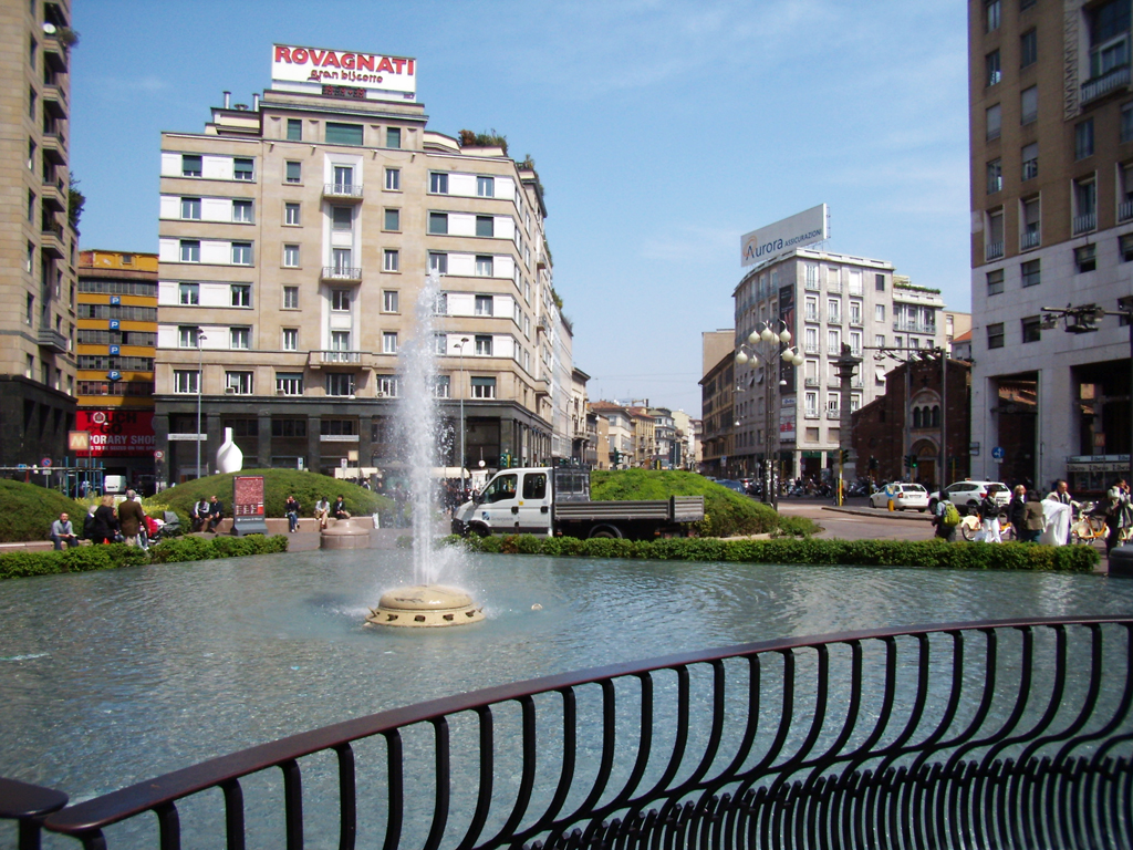 Piazza San Babila a Milano